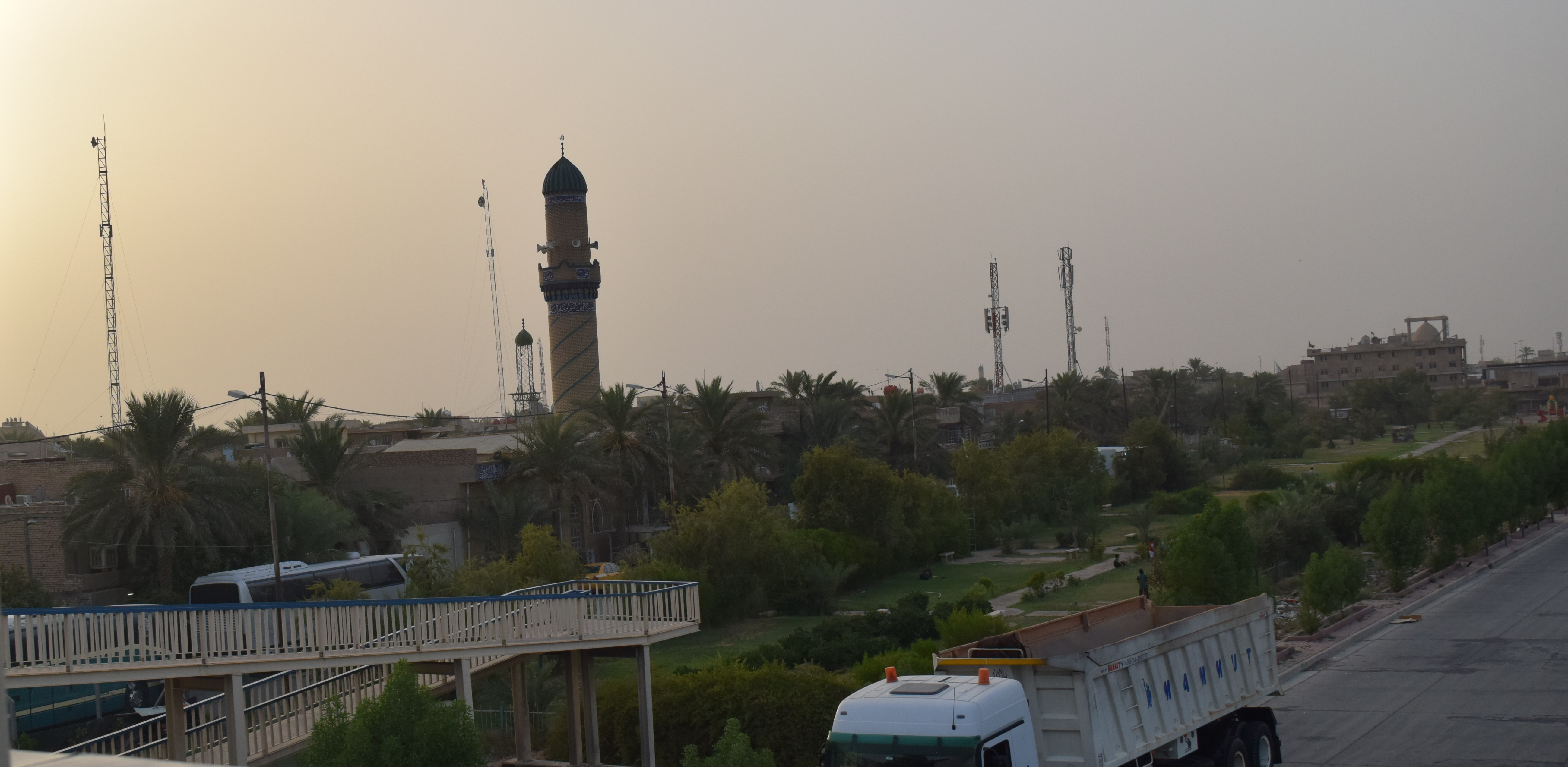 صورة تظهر فيها "مدينة الشعلة" و"الطريق الخارجي رقم 1" في العراق. وقت الغروب.